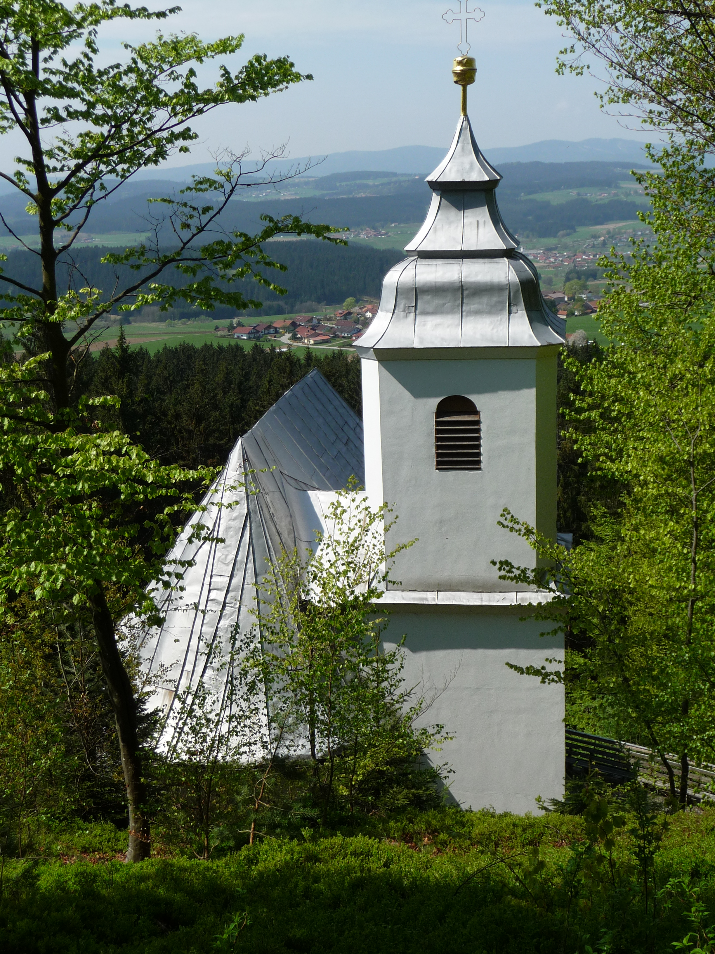 Die Wallfahrtskirche Frauenbrünnl bei Rinchnach